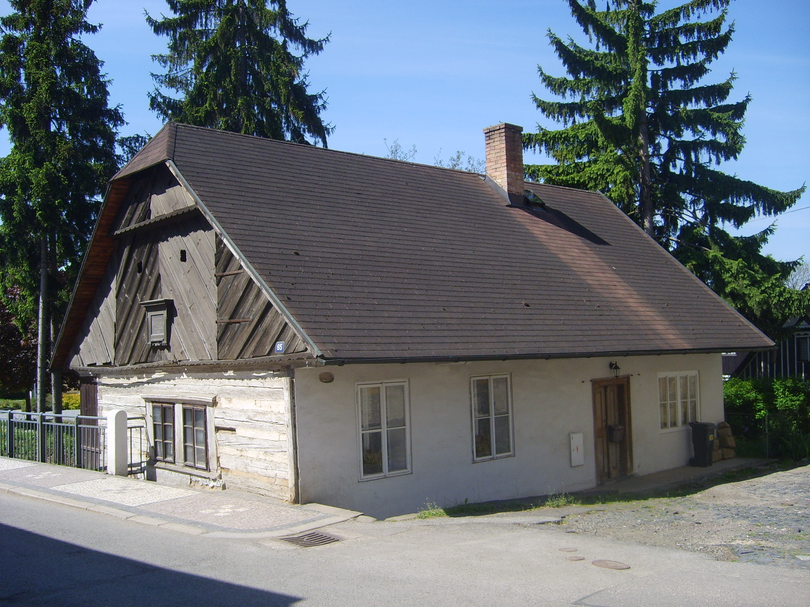 Birthplace of František Věnceslav Jeřábek (1836-1893) in Sobotka, Czech Republic (street: Boleslavská 65)